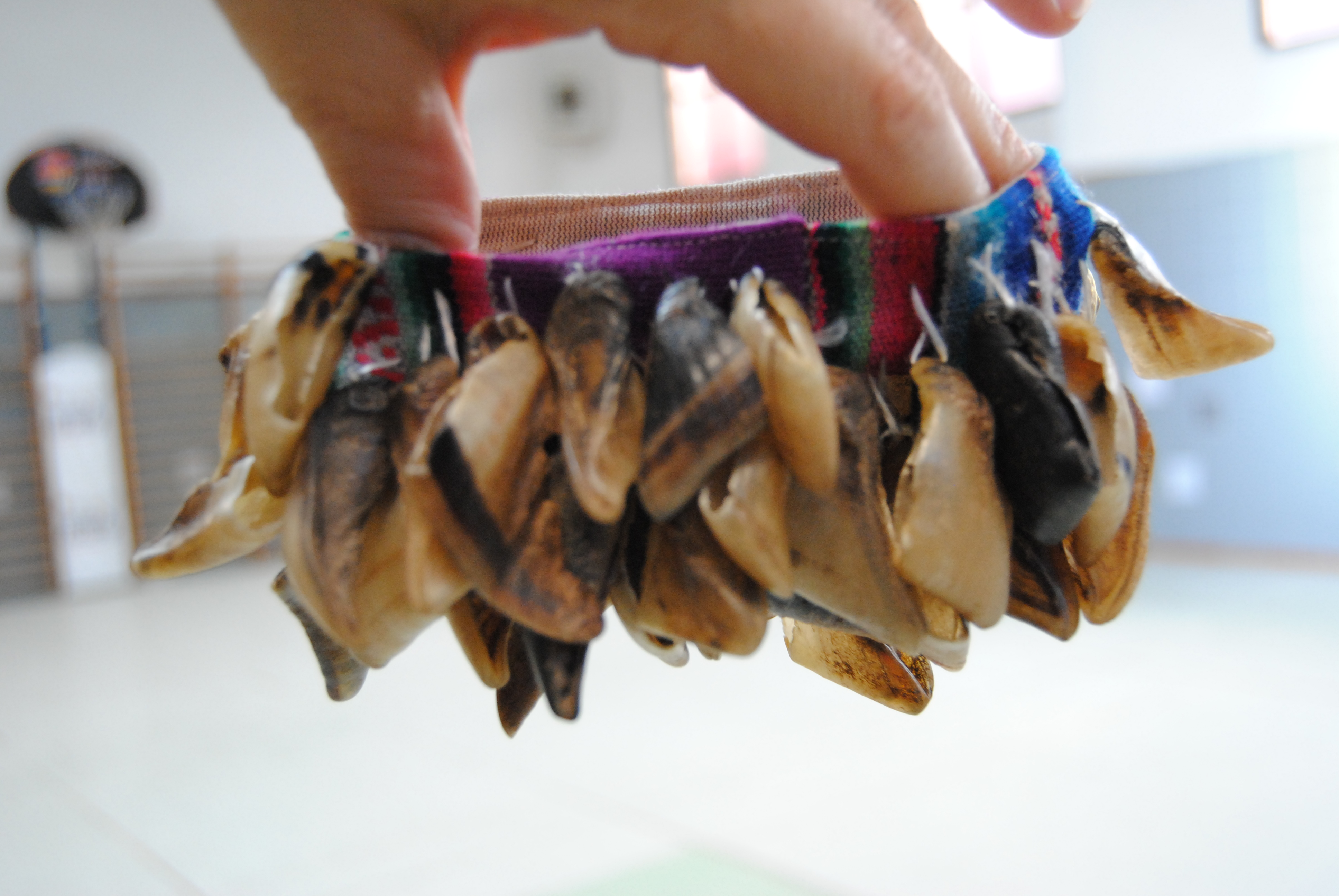 Chajchas de pezuña de cabra como sonaja